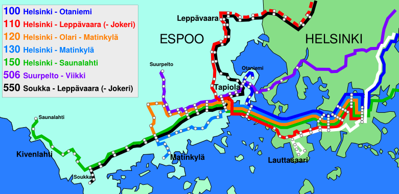 Tramwest-linjasto